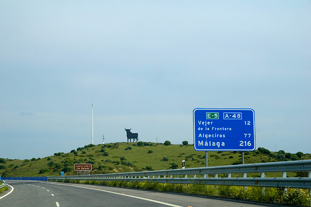 imagen de la Autovía A-48